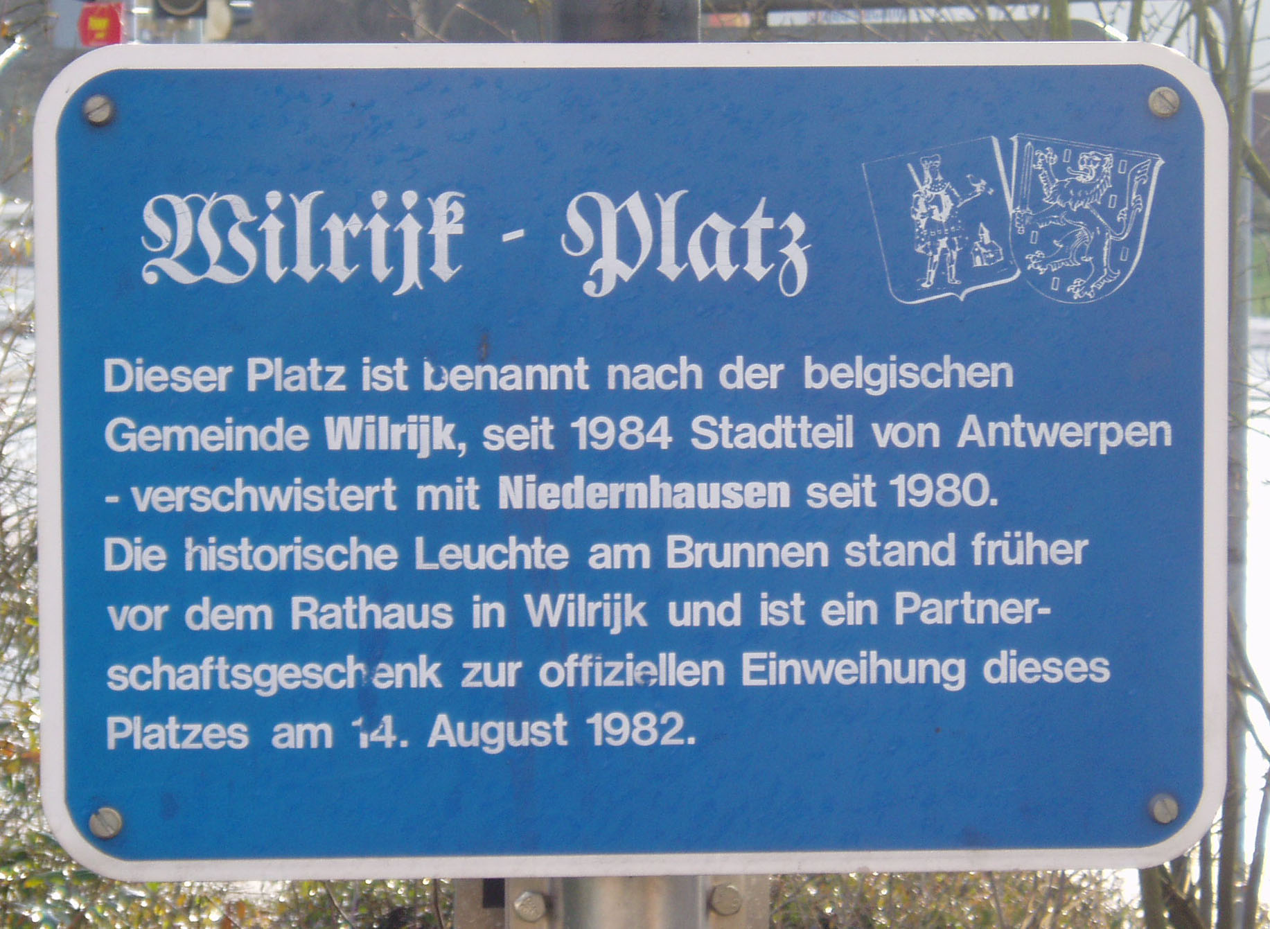 Niedernhausen im Taunus: Schild vor dem Rathaus.